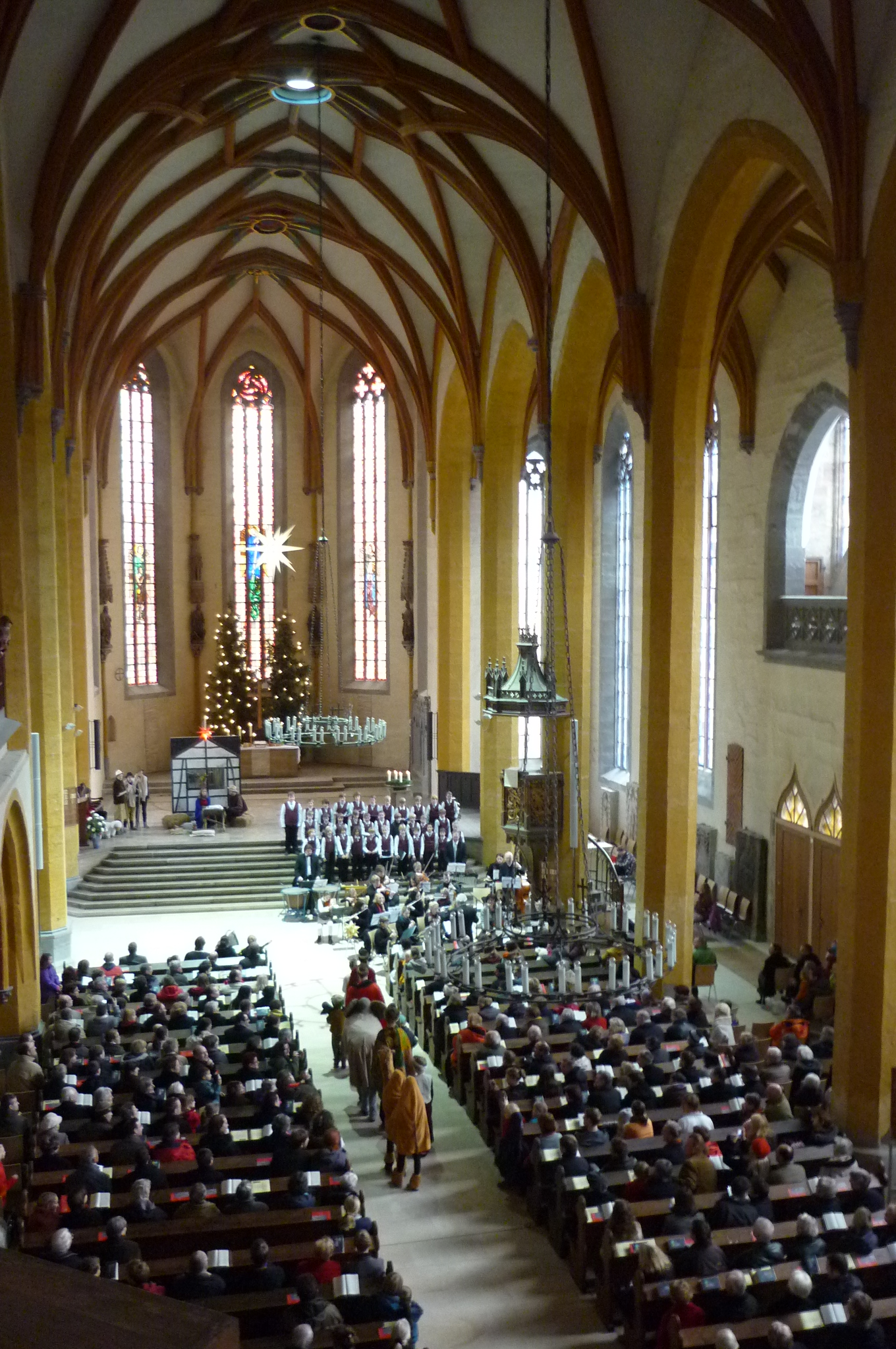 Langschiff der Stadtkirche St. Michael Jena am 1. Weihnachtsfeiertag 2012, Weihnachtsgesichte von Carl Orff